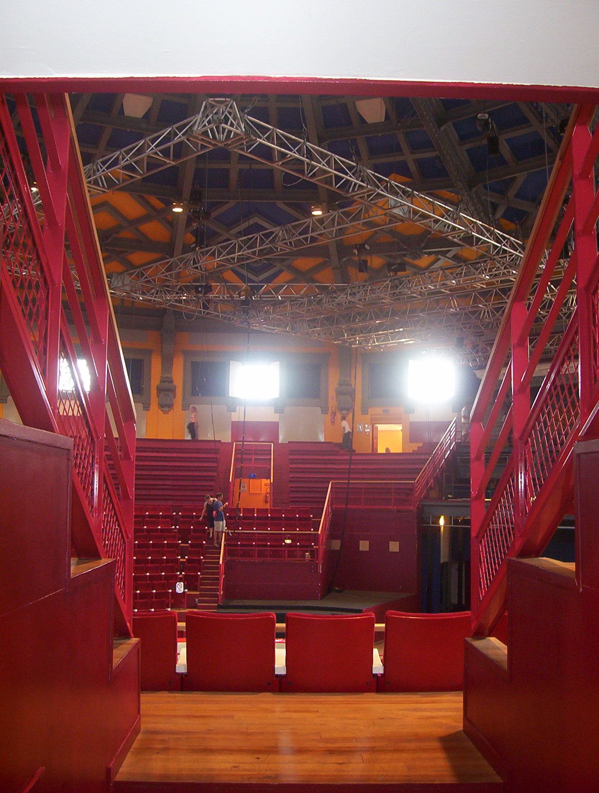 Cirque municipal d'Amiens : gradins.